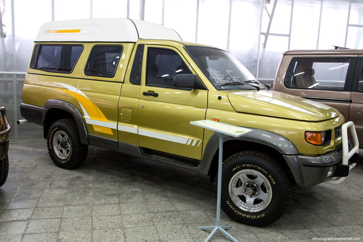 УАЗ-2760. Опытный образец выпущен ЦОП УГК в 2001 году.Выставочный павильон-музей УАЗа.